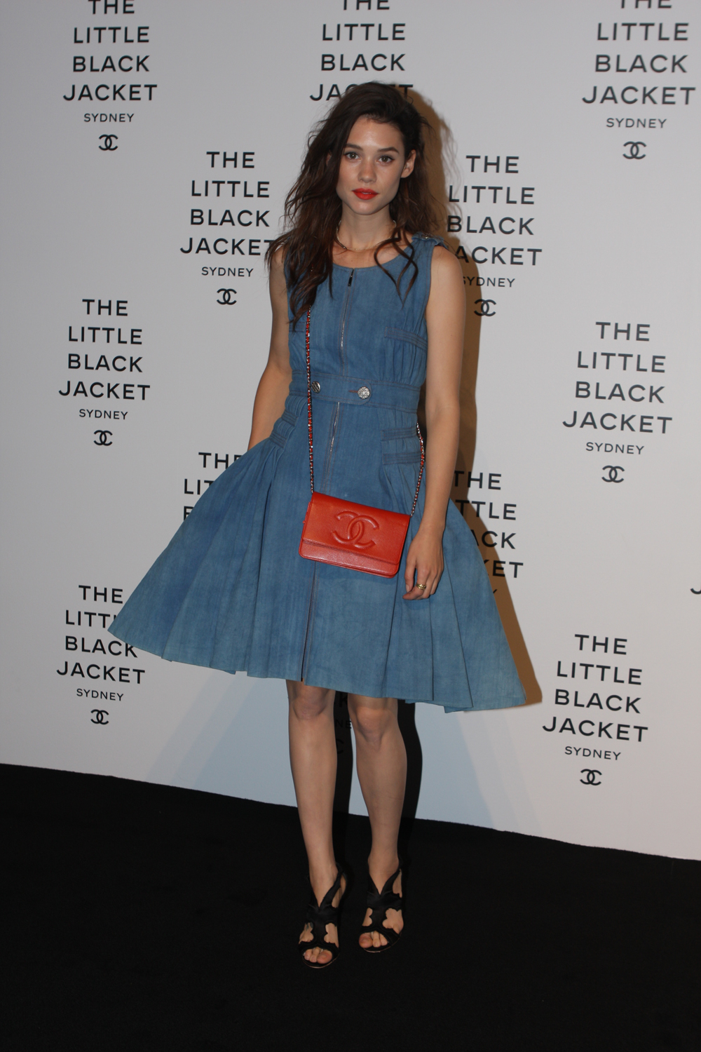 Astrid Bergès-Frisbey, 2012